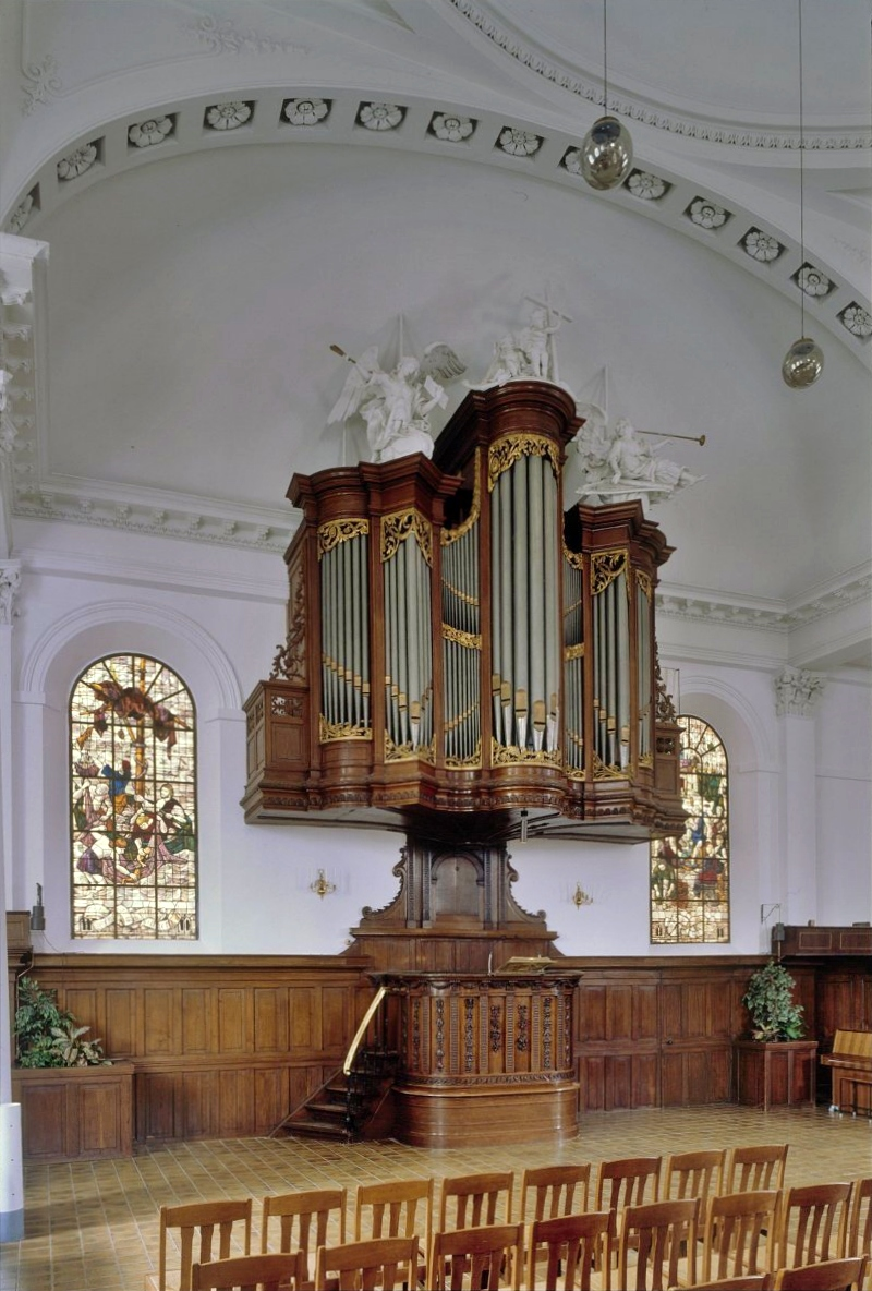 Doopsgezinde kerk: Interieur, aanzicht orgel (opmerking: Gefotografeerd voor Het Historische Orgel in Nederland 1769-1790)